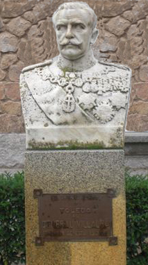 Busto del General Jose Villalba Riquelme que se conserva en la Academia de Infanteria de Toledo, en la seccion de educacion fisica y deportes